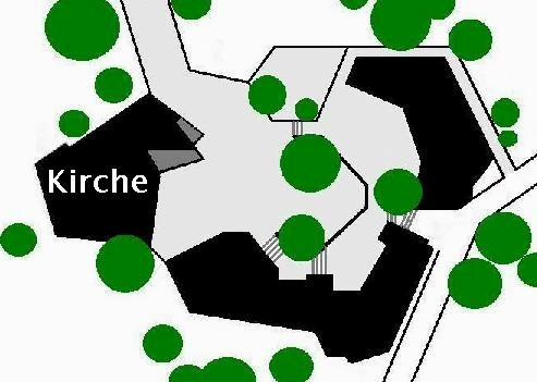 Lageplan der Zwölf-Apostel-Kirche Hildesheim